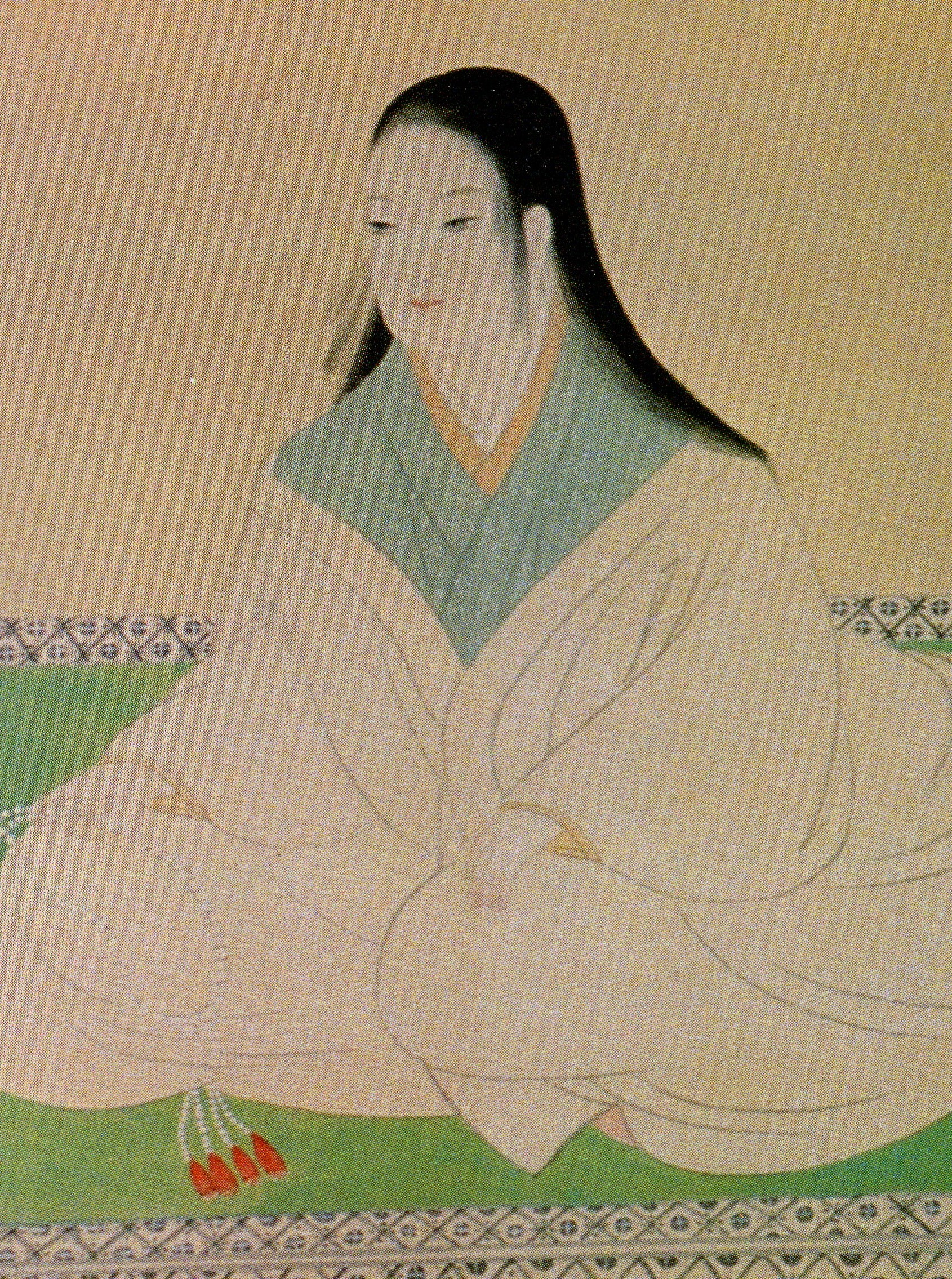 駒姫(最上義光の女、豊臣秀次の側室)の肖像。